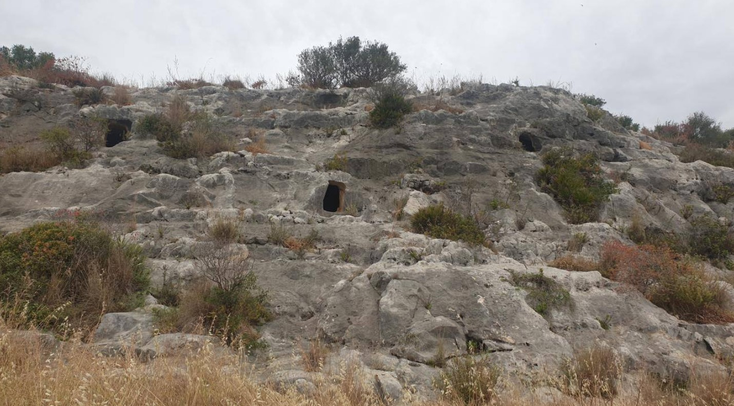 Quattro tombe a grotticella artificiale